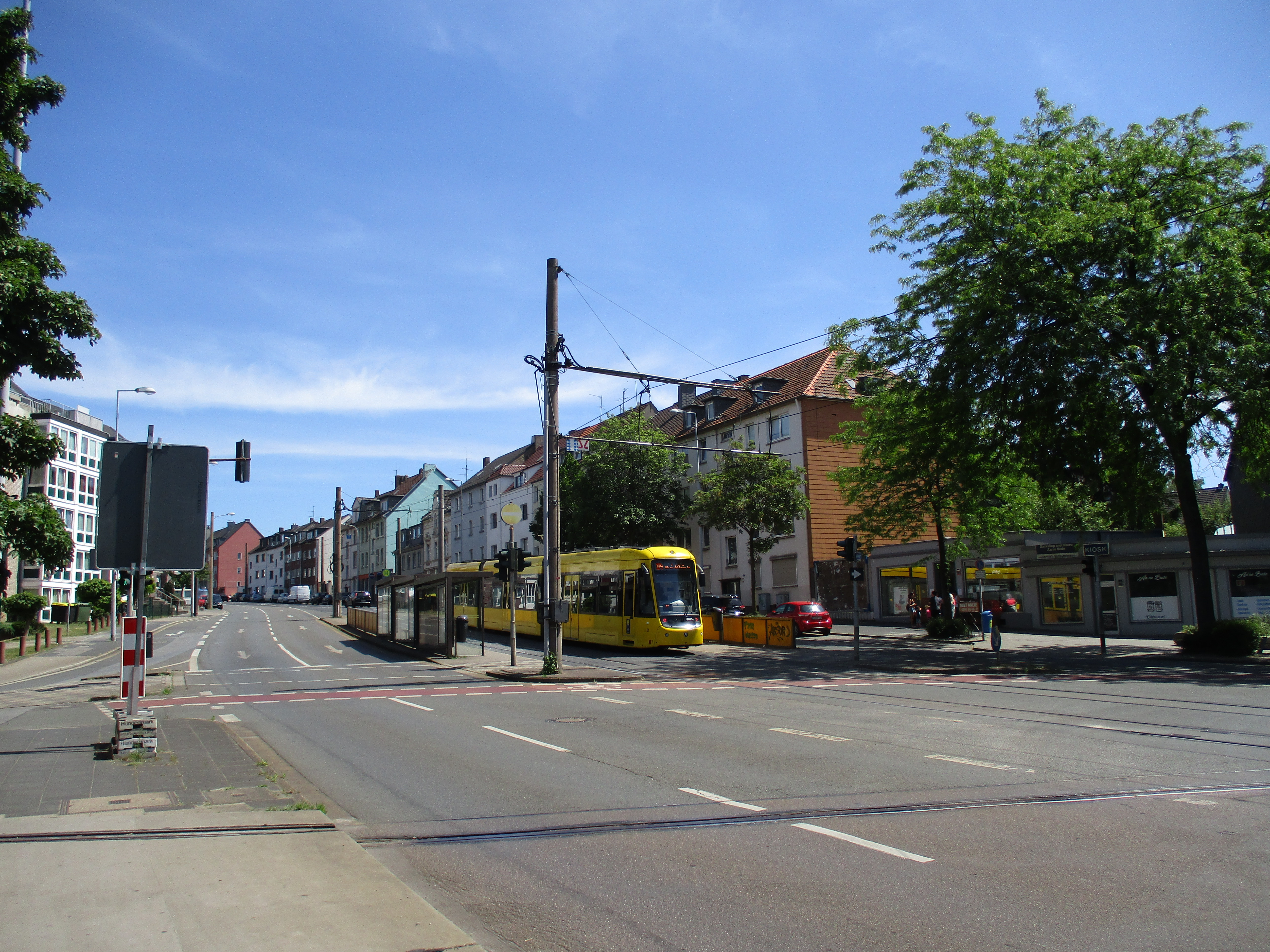 Aktienstraße Mülheim an der Ruhr, Richtung Essen und Straßenbahn 104 "Mülheim Saarn" an der Haltestelle. Technische Daten Straßenbahn: Hersteller: Bombardier Baureihe: M8D-NF2 - 8xNfGlTwZR Baujahr: 2015 Name: Mülheim Saarn Wagennummer: 8005 Farbe: gelb-schwarz